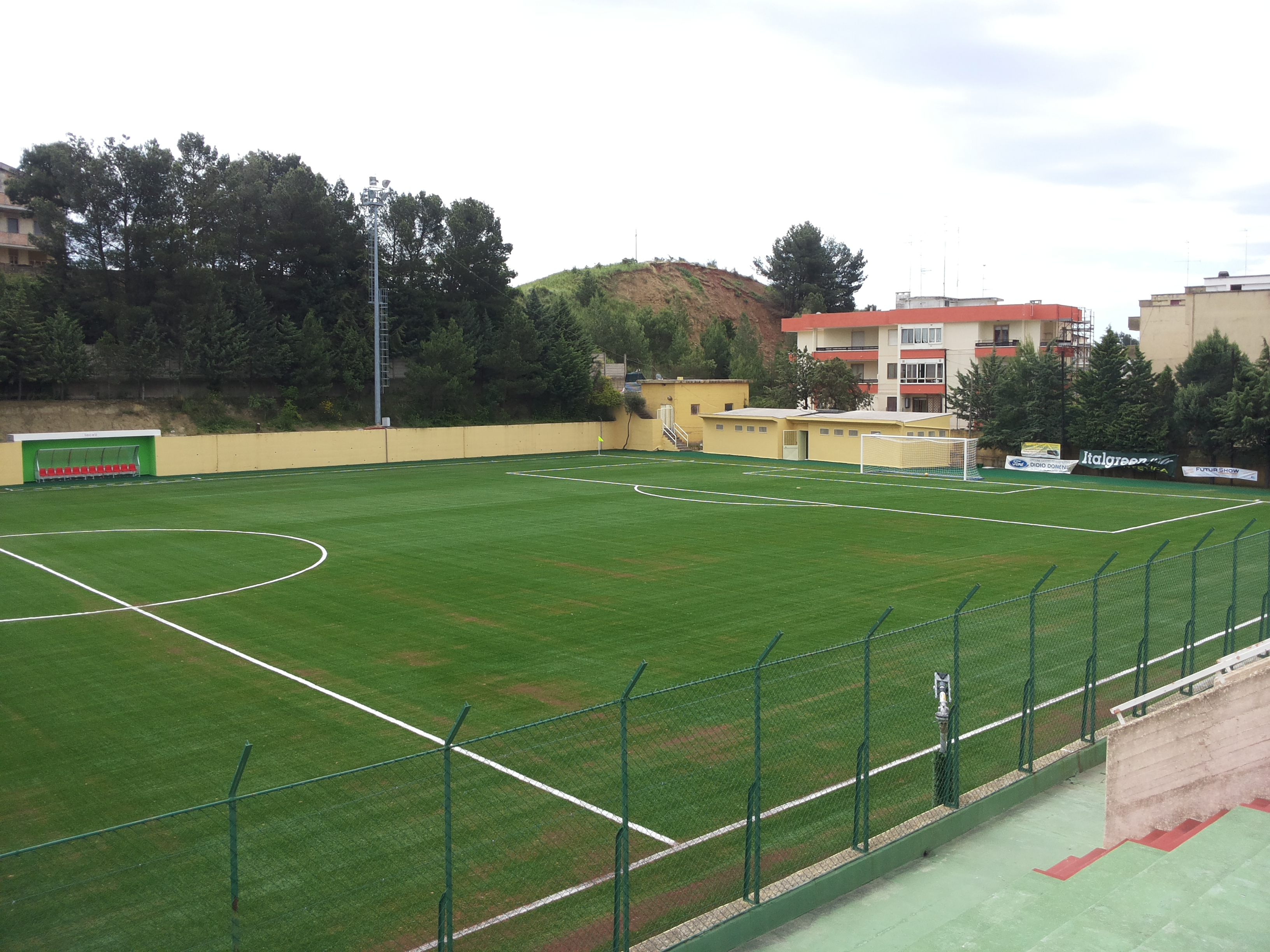 Campo Sportivo di Montescaglioso, in erbetta sintetica